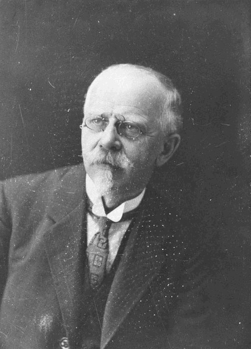 Alois Jaroněk, moravský výtvarník